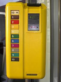 Prodata-ontwaarder, eigen foto